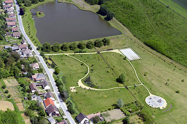 Légi fotó